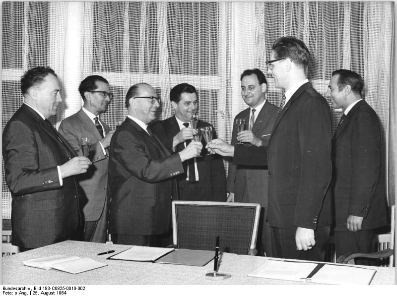 Zentralbild 25.8.1964 Autobahnbrücke bei Hirschberg wird aufgebaut. Protokoll und Vereinbarung von Vertretern beider deutscher Staaten unterzeichnet. Am 14.8.1964 erfolgte die Unterzeichnung des Protokolls und der Vereinbarung über den Wiederaufbau der Autobahnbrücke bei Hirschberg zwichen den Vertretern der zuständigen Behörden der Deutschen Demokratischen Republik und der Bundesrepublik. UBz: Nach der Unterzeichnung des Protokolls und der Vereinbarung. Rechts die Delegierten der DDR unter Leitung von Bauingenieur Siegfried Kasper, Stellvertreter des Leiters der Hauptverwaltung Straßenwesen im Ministerium für Verkehrswesen der DDR (2.v.r.) und den Leiter der Delegation der Bundesrepublik, Herrn Dr. Kurt Leopold, Leiter der Treuhandstelle (3.v.l.).